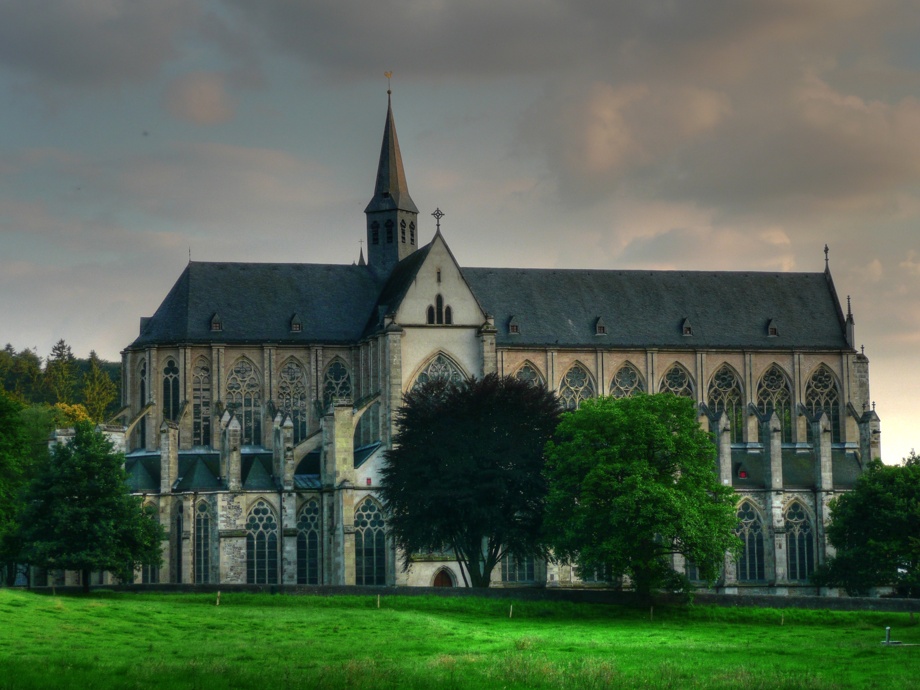 Der Altenberger Dom